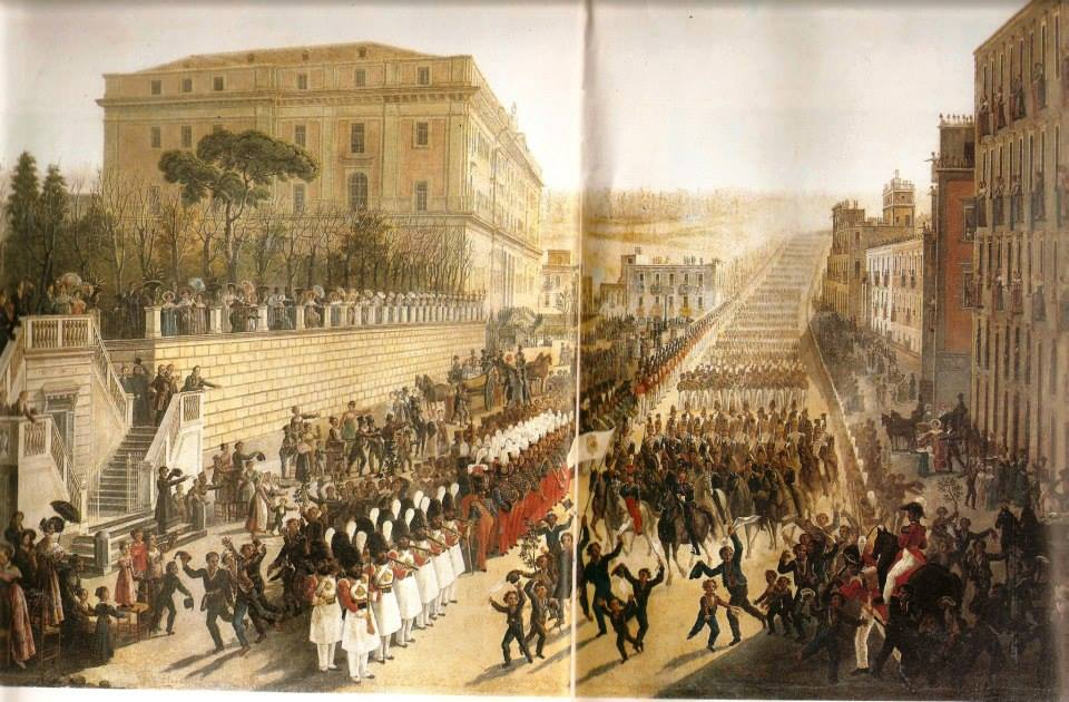 Rientro trionfale di Ferdinando I re delle Due Sicilie in Napoli (1815) dopo l'esilio a Palermo durante il periodo murattiano.